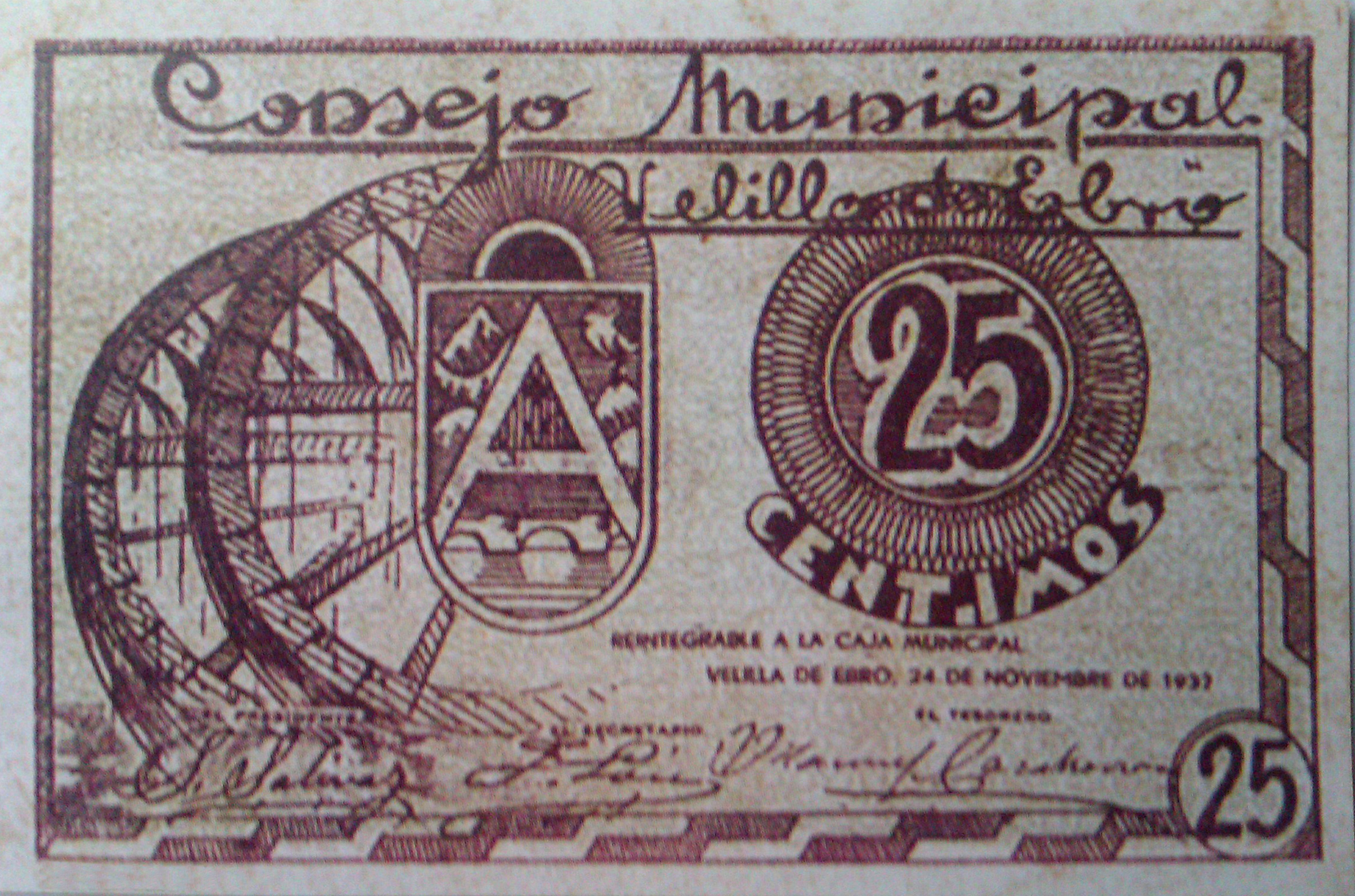 Aragonés: 25 centimos